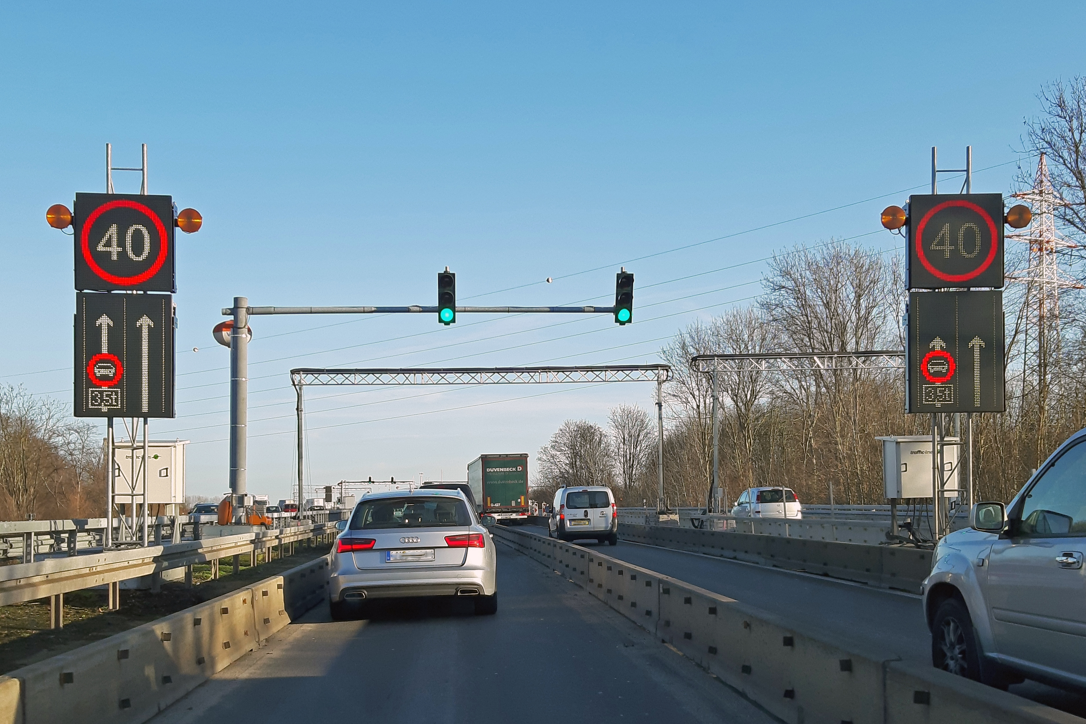 Rheinbrücke Neuenkamp, Duisburg. Einengung der Fahrspuren und Geschwindigkeitsbegrenzung für LKW-Waage, die wegen Brückenschäden eingerichtet wurde.